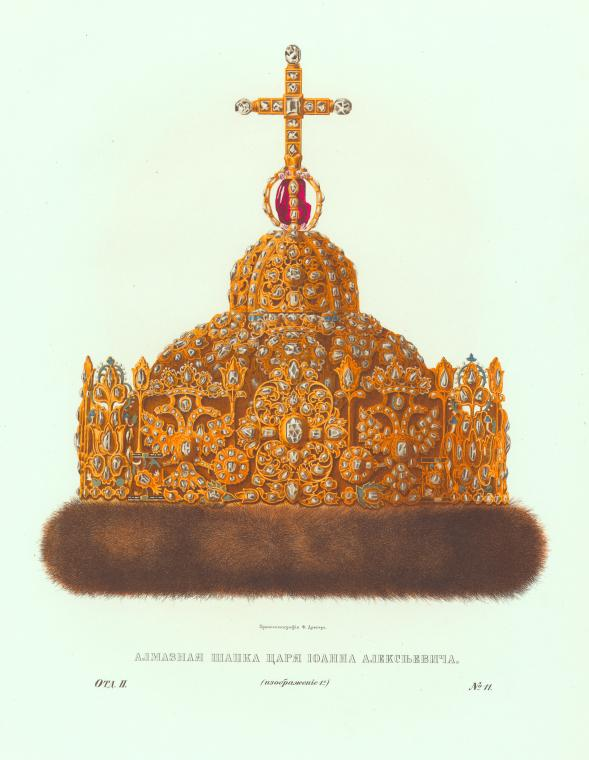 Алмазный венец для царя Ивана Алексеевича